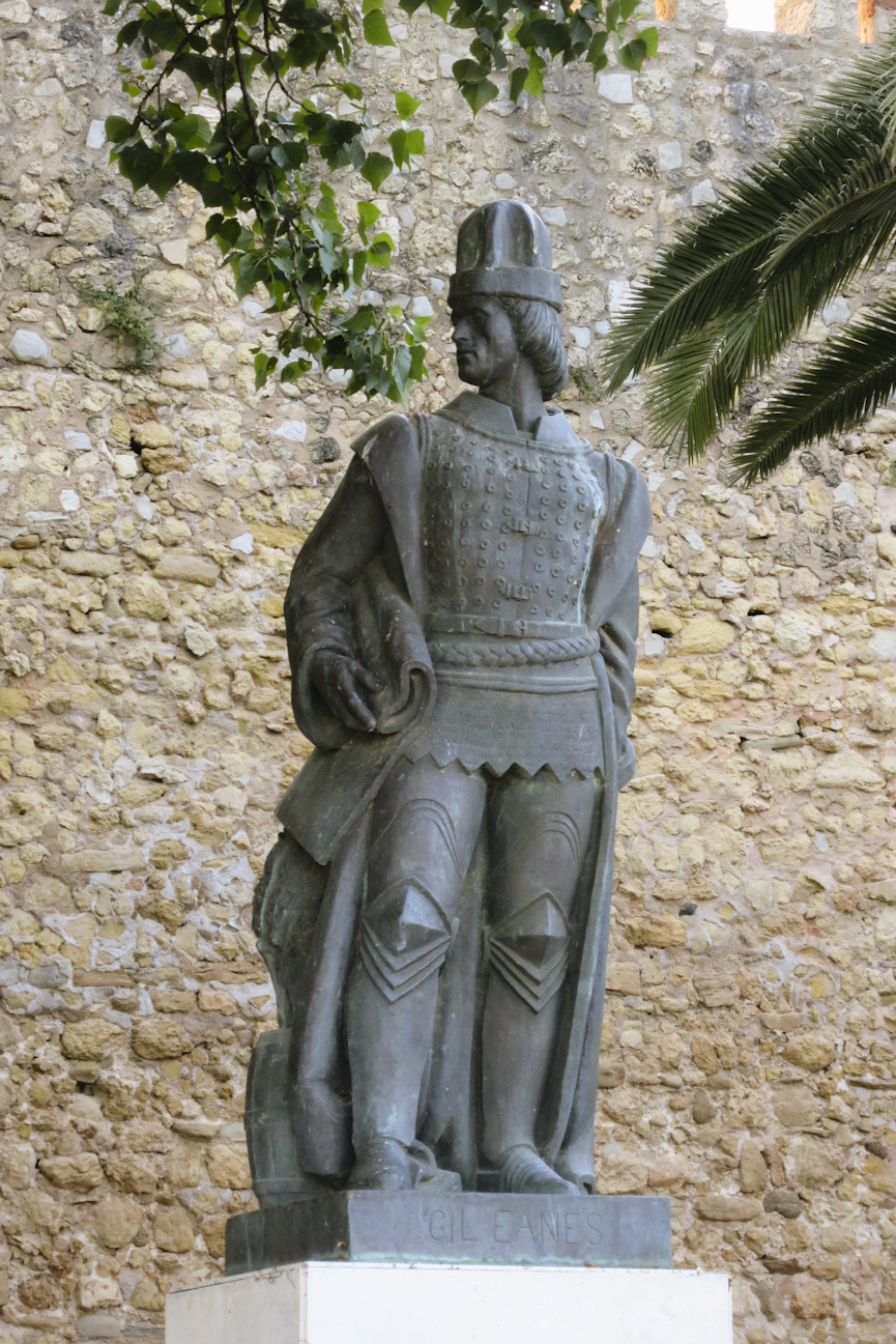 Canto da Maia, Gil Eanes, c. 1948 (inaugurado em 1969), bronze, Lagos